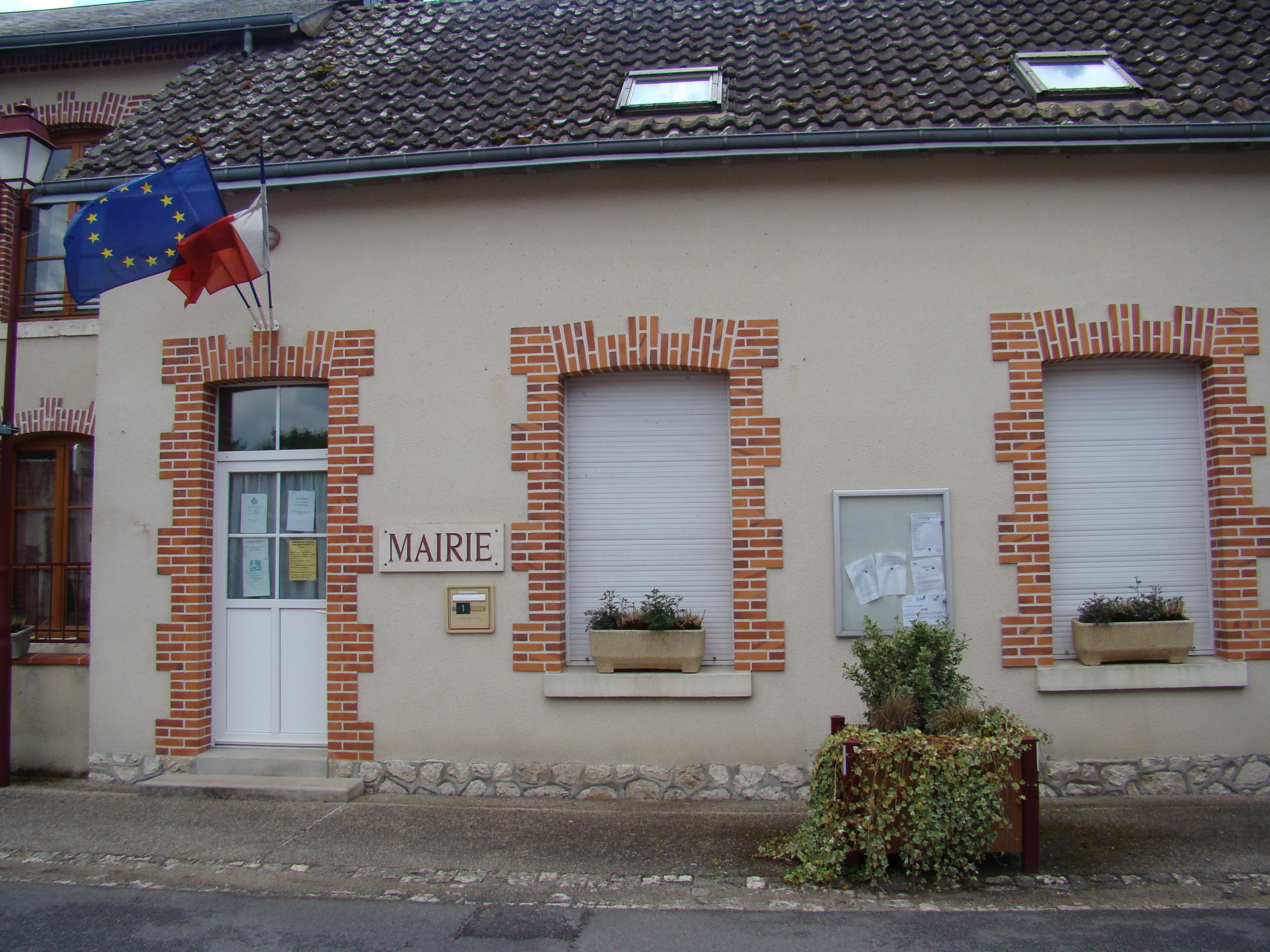 Mairie de Veilleins (Loir-et-Cher)